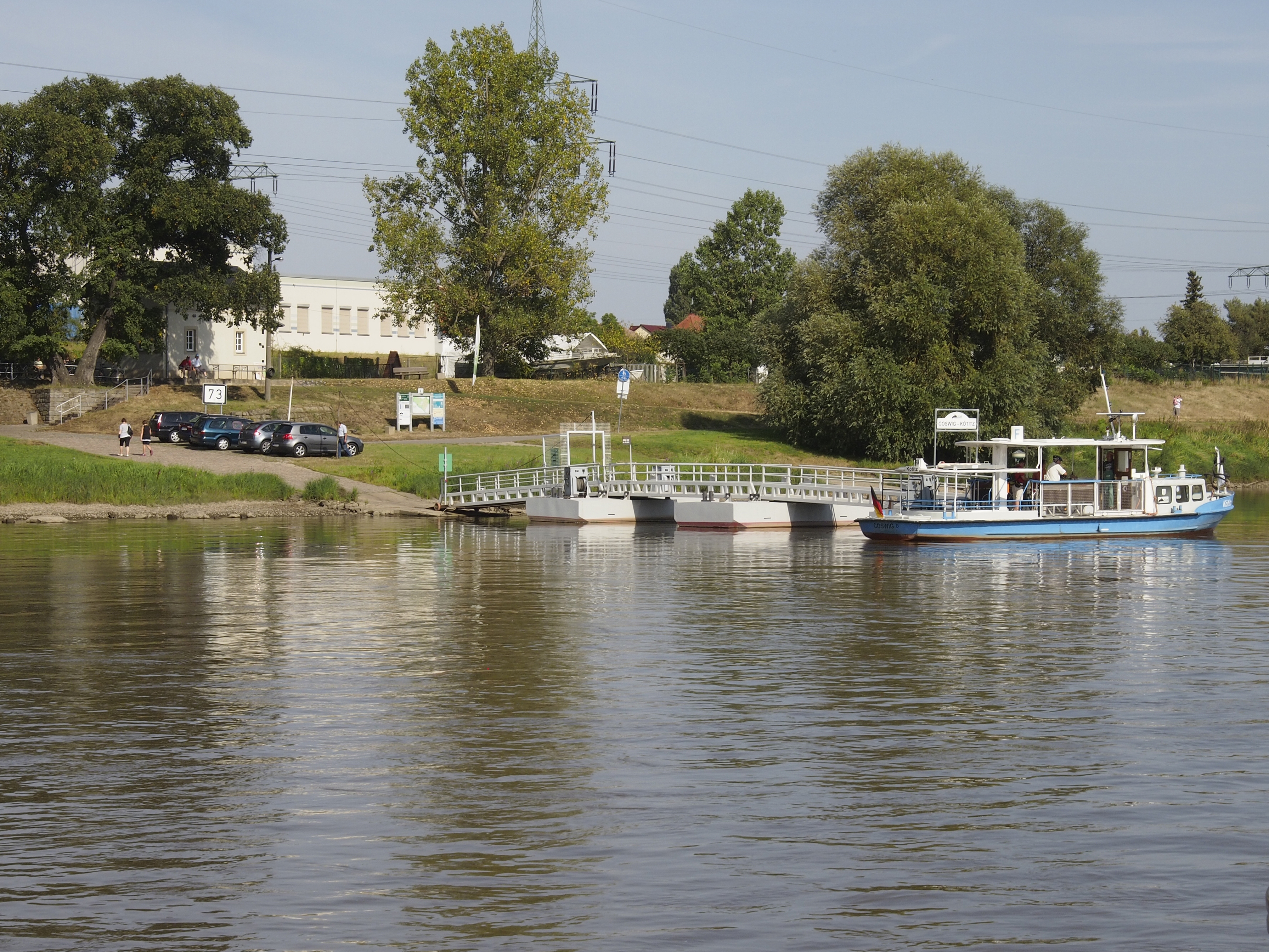 Elbfähre von Kötitz (Coswig) nach Gauernitz